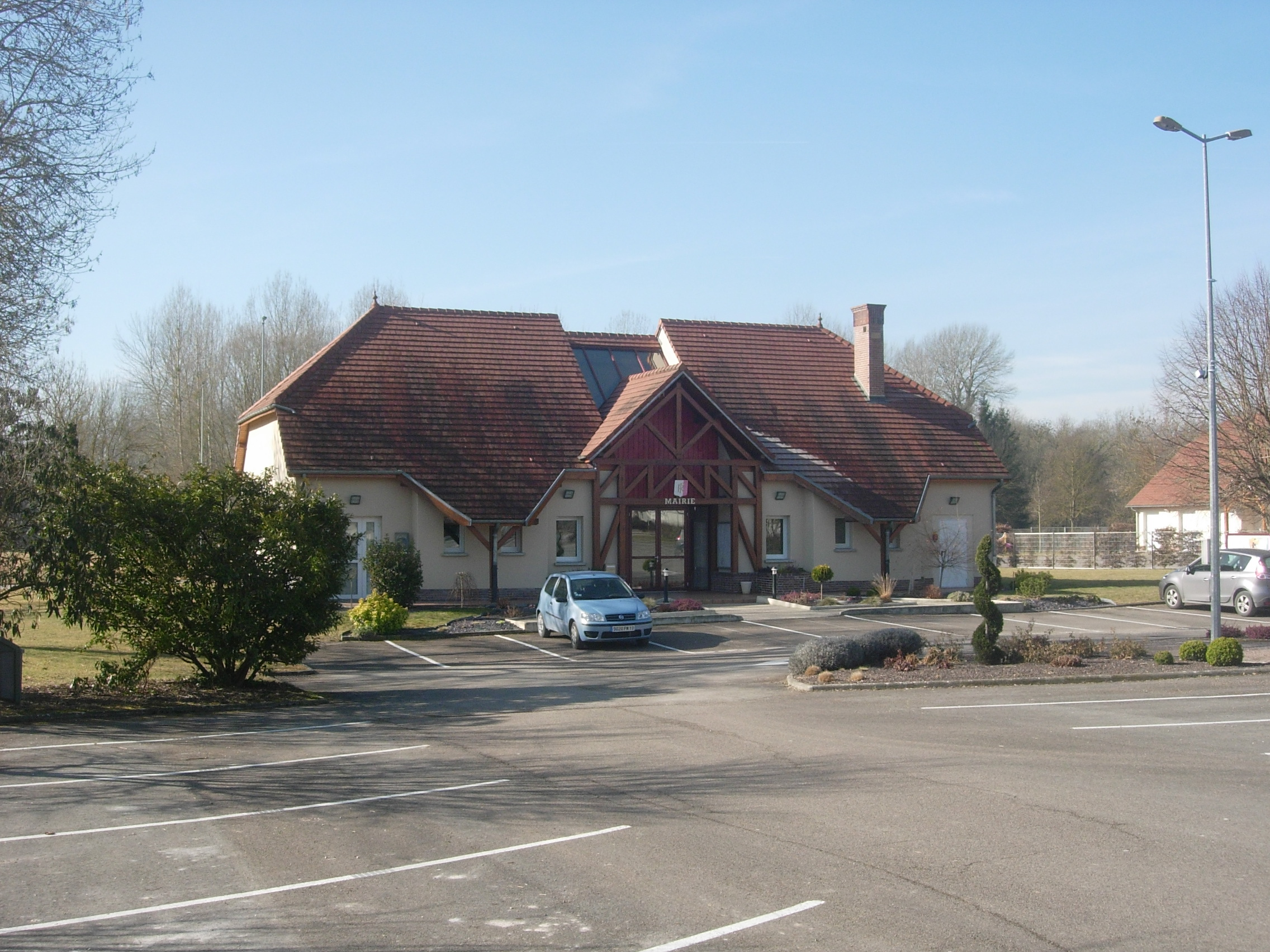 Mairie de Villechétif (Aube, France).